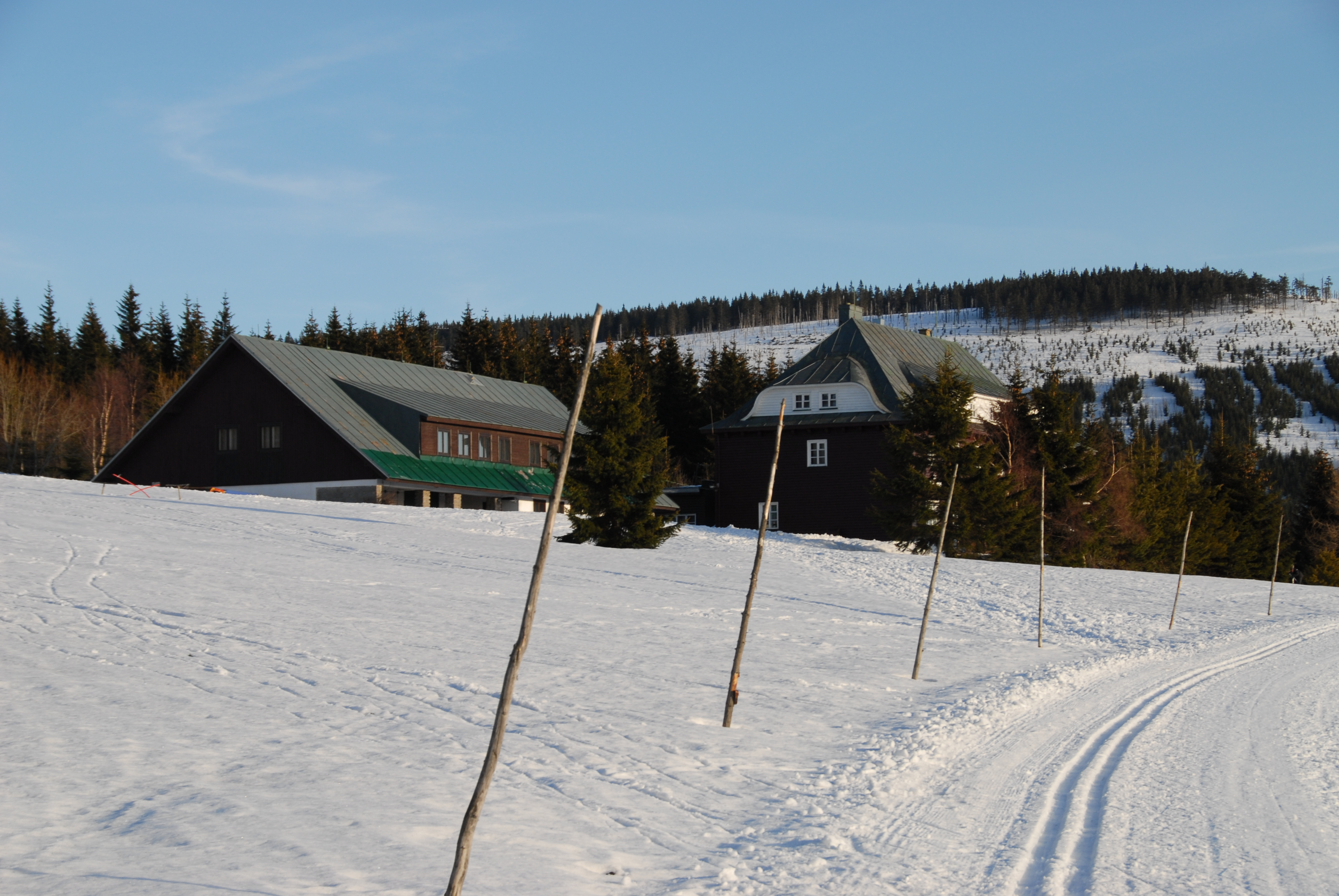 Hrnčířské boudy v Krkonoších v zimě